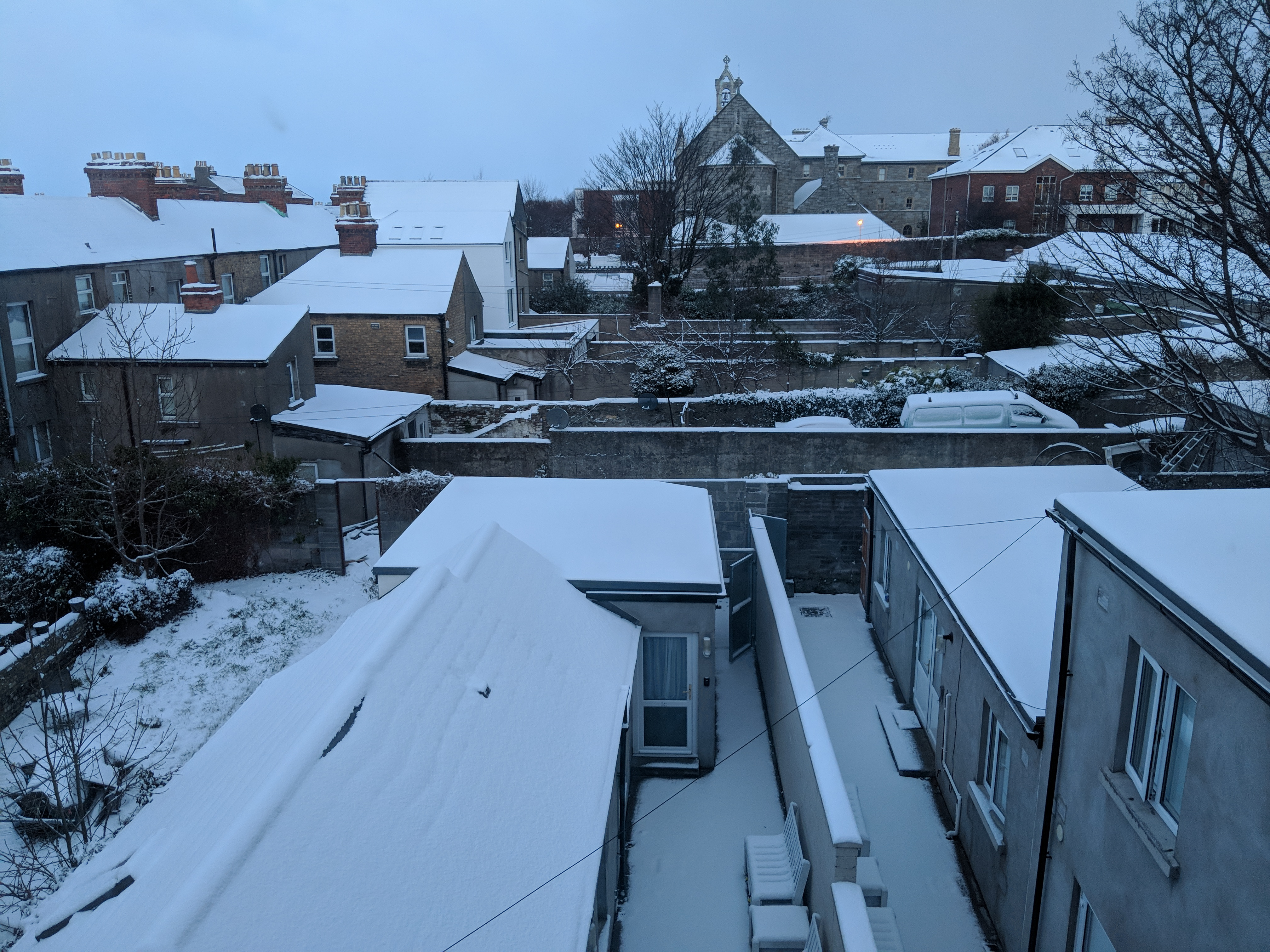 Maker:0x4c,Date:2017-10-2,Ver:4,Lens:Kan03,Act:Lar01,E-Y